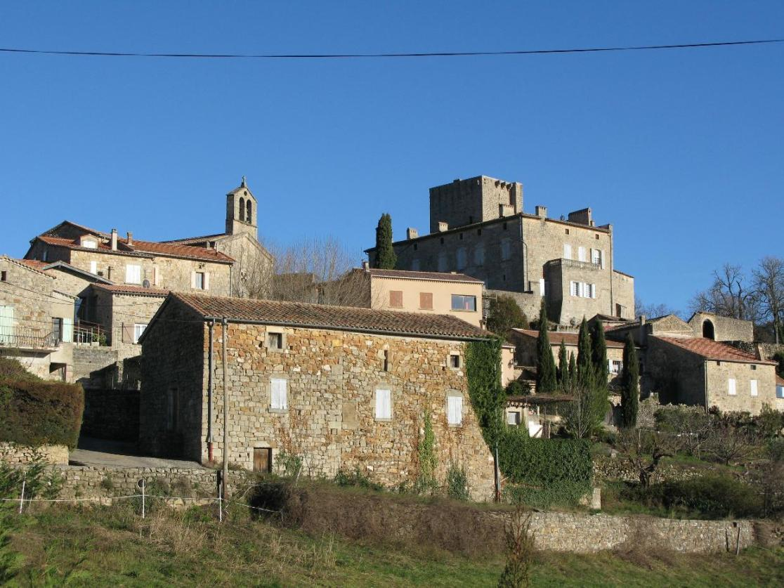 Village de Tauriers (Ardèche)